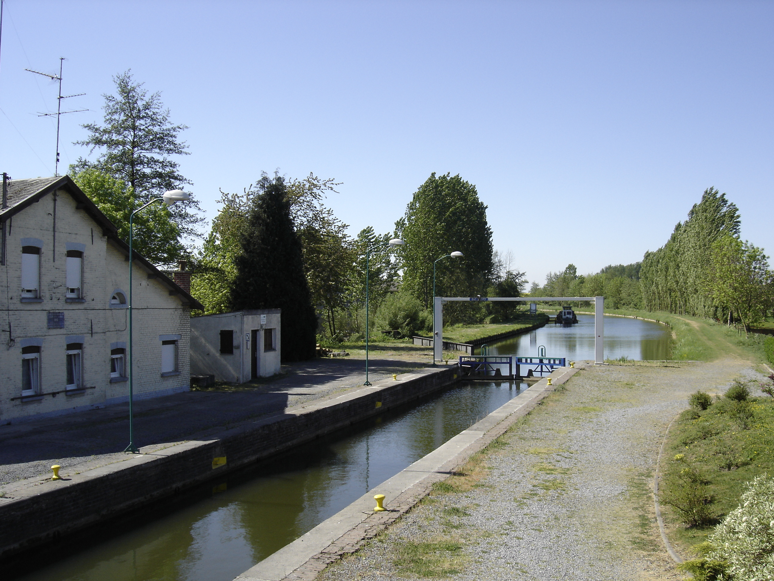 Ors - the lock on canal de la Sambre à l'Oise